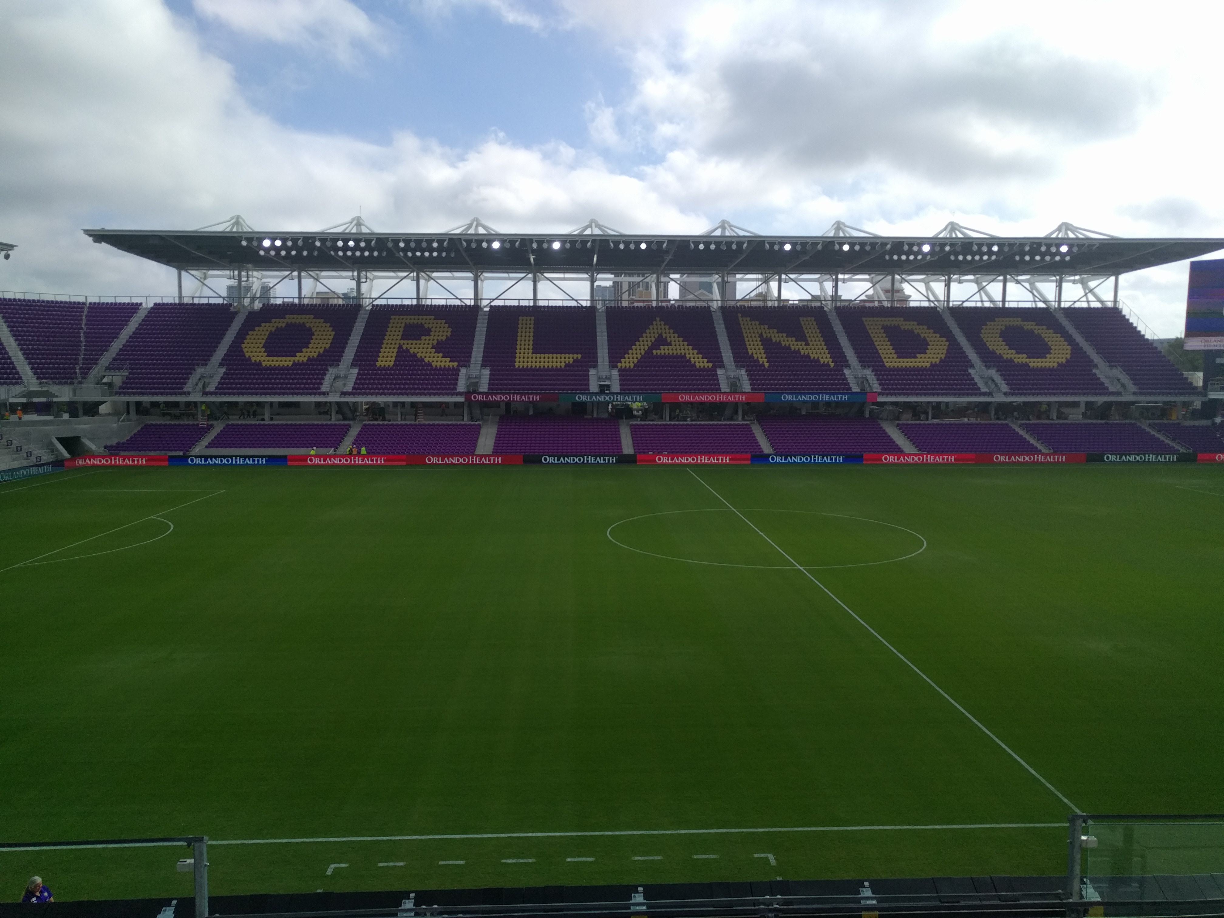 Open House Event